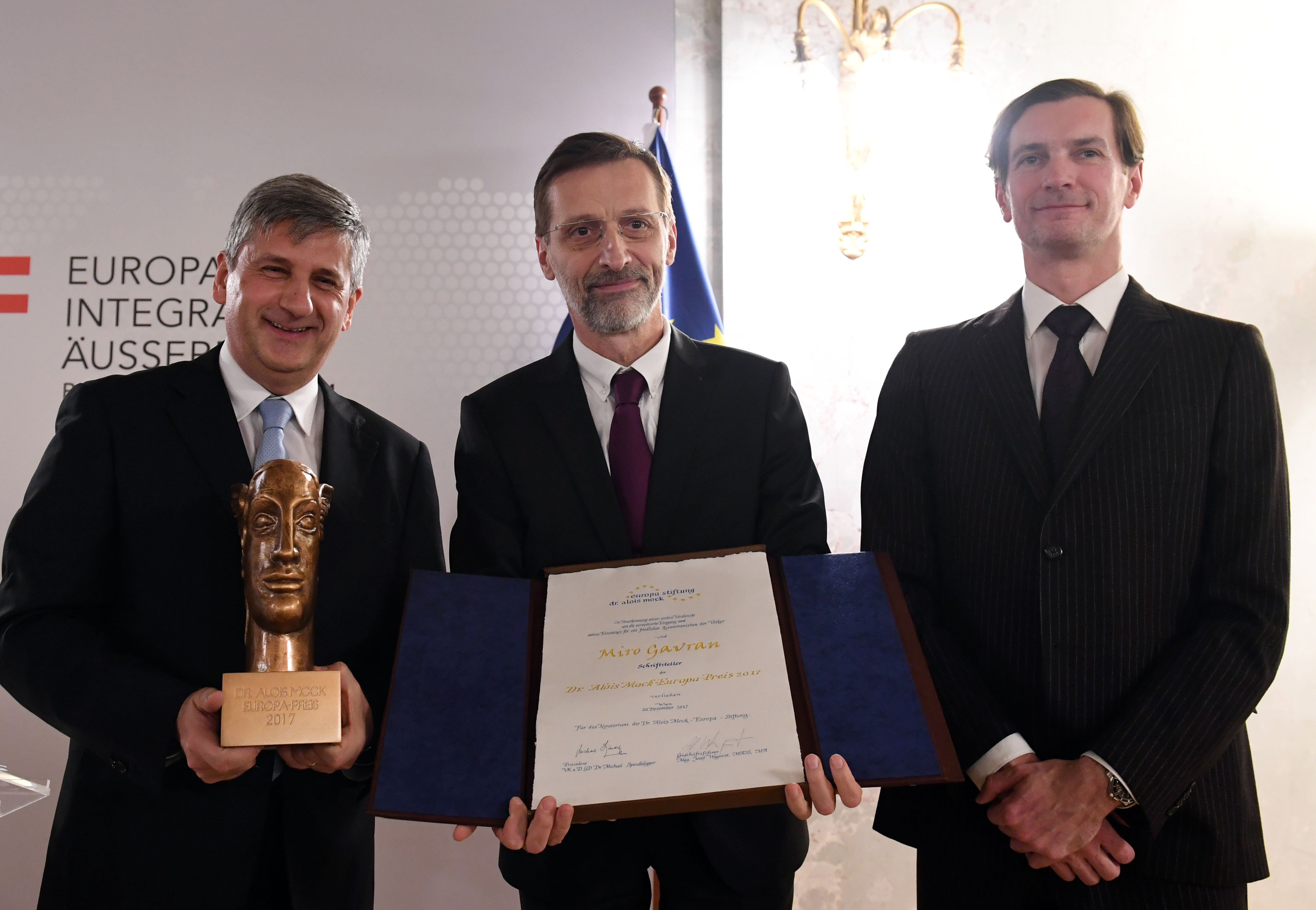 Mittwoch, den 20. Dezember 2017 überreichte Generalsekretär Linhart im Alois Mock Saal des Außenministeriums den Dr. Alois Mock-Europa-Preis. Foto: Mahmoud